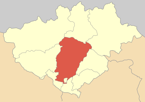 Дем Драма на картата на Ном Драма, Гърция Locator map of Drama municipality (Δήμος Δράμας) in Drama prefecture (Νομός Δράμας) in Greece.